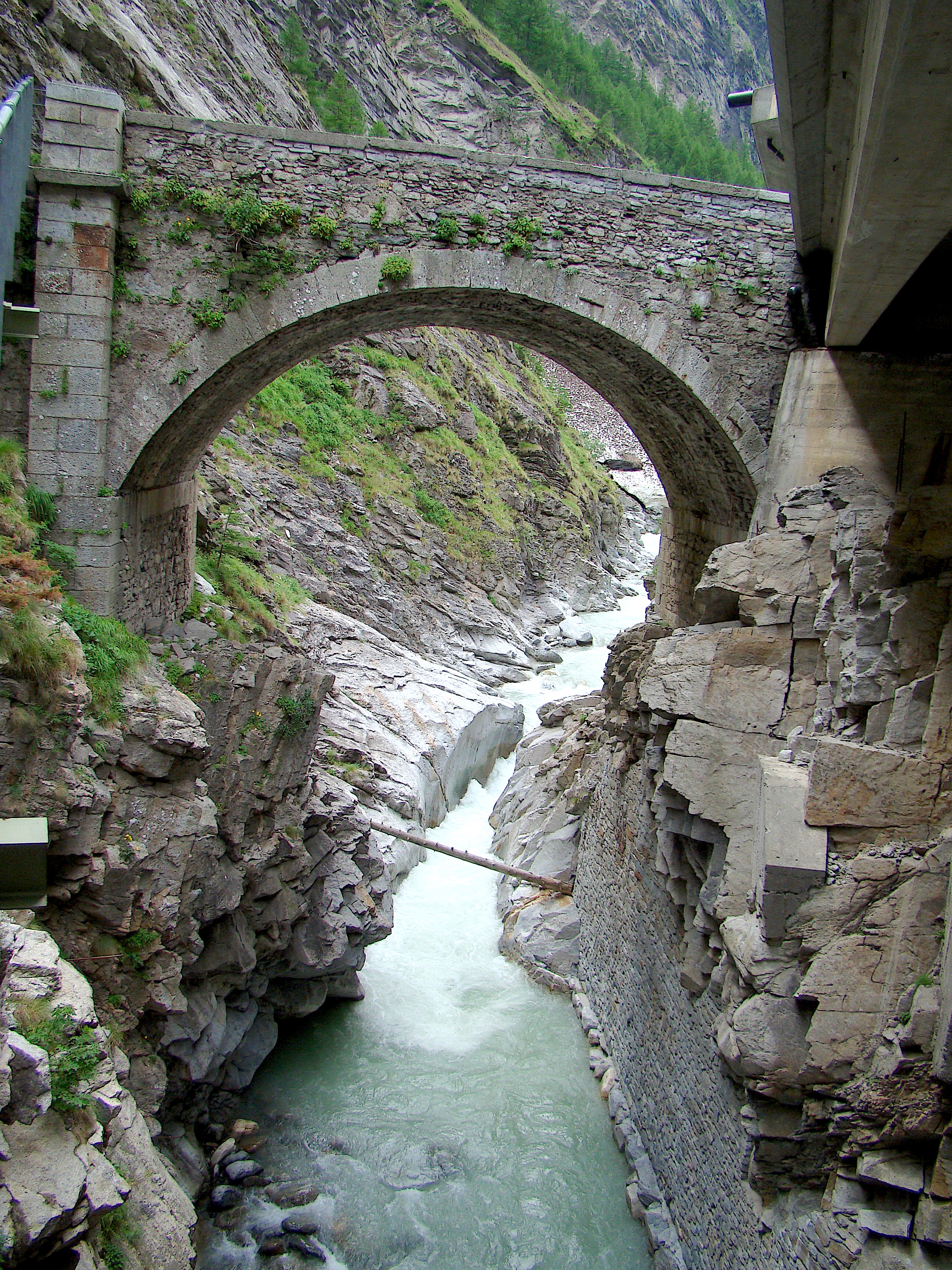 Eine der alten Napoleon-Brücken in der Gondoschlucht